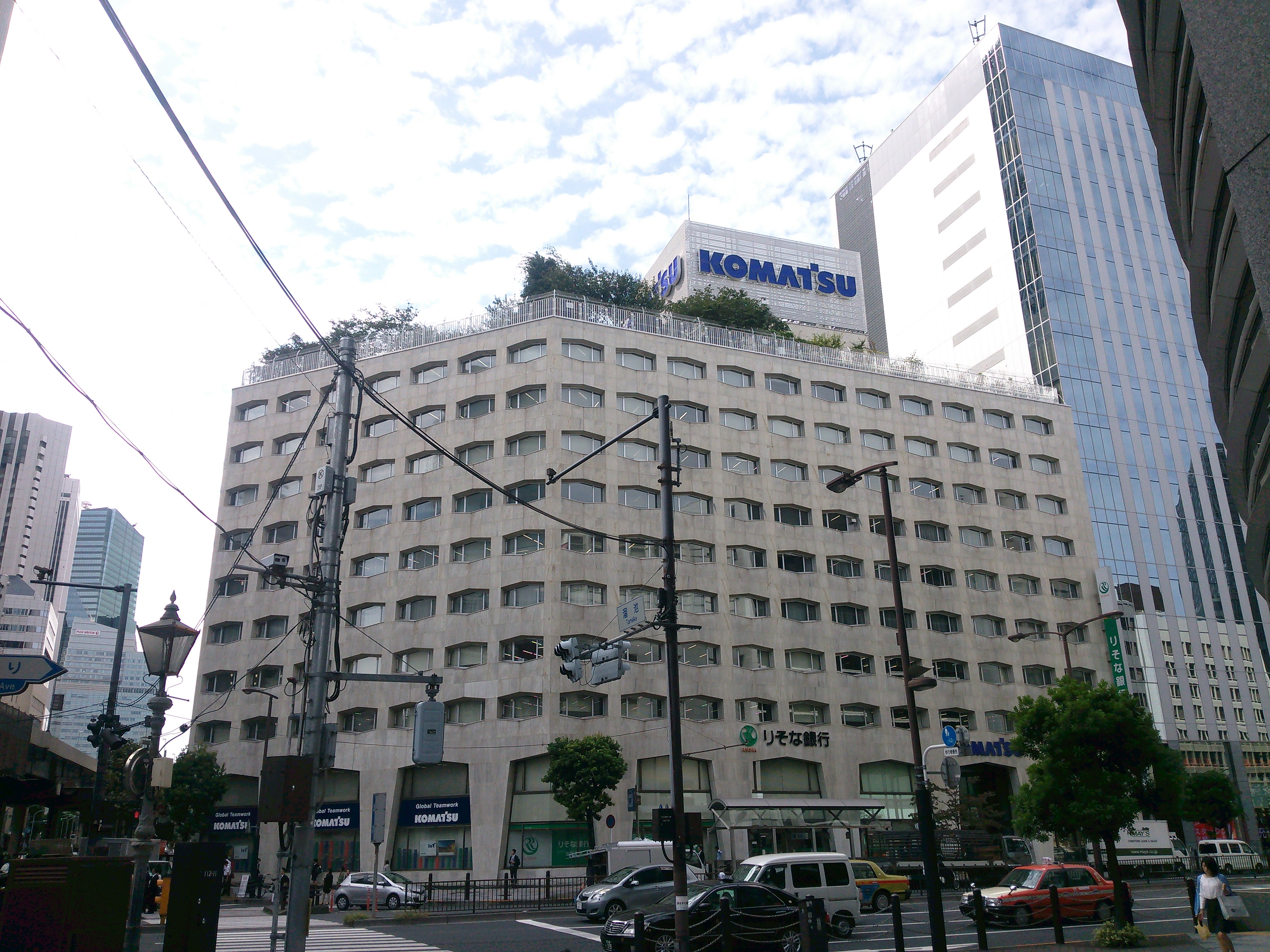 東京都港区赤坂、コマツビル